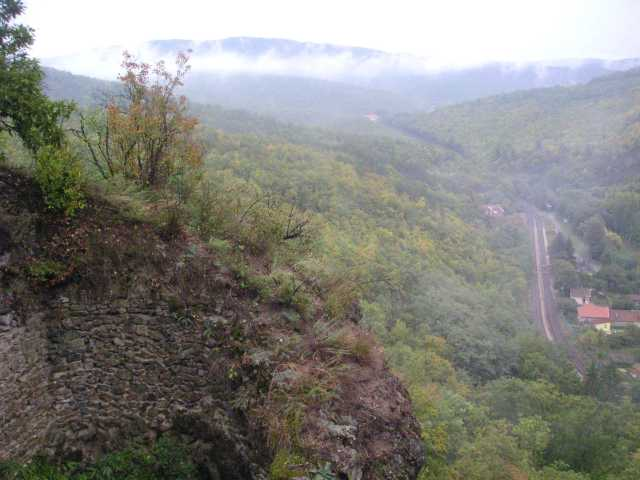 Widok z ruin zamku w Szarvaskő